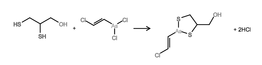 schema della reazione tra la lewisite e il dimercaprolo